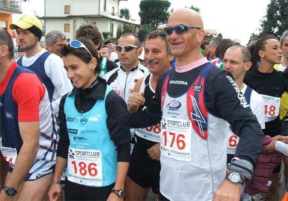 Partenza 6 ore Bergamasca edizione 2007